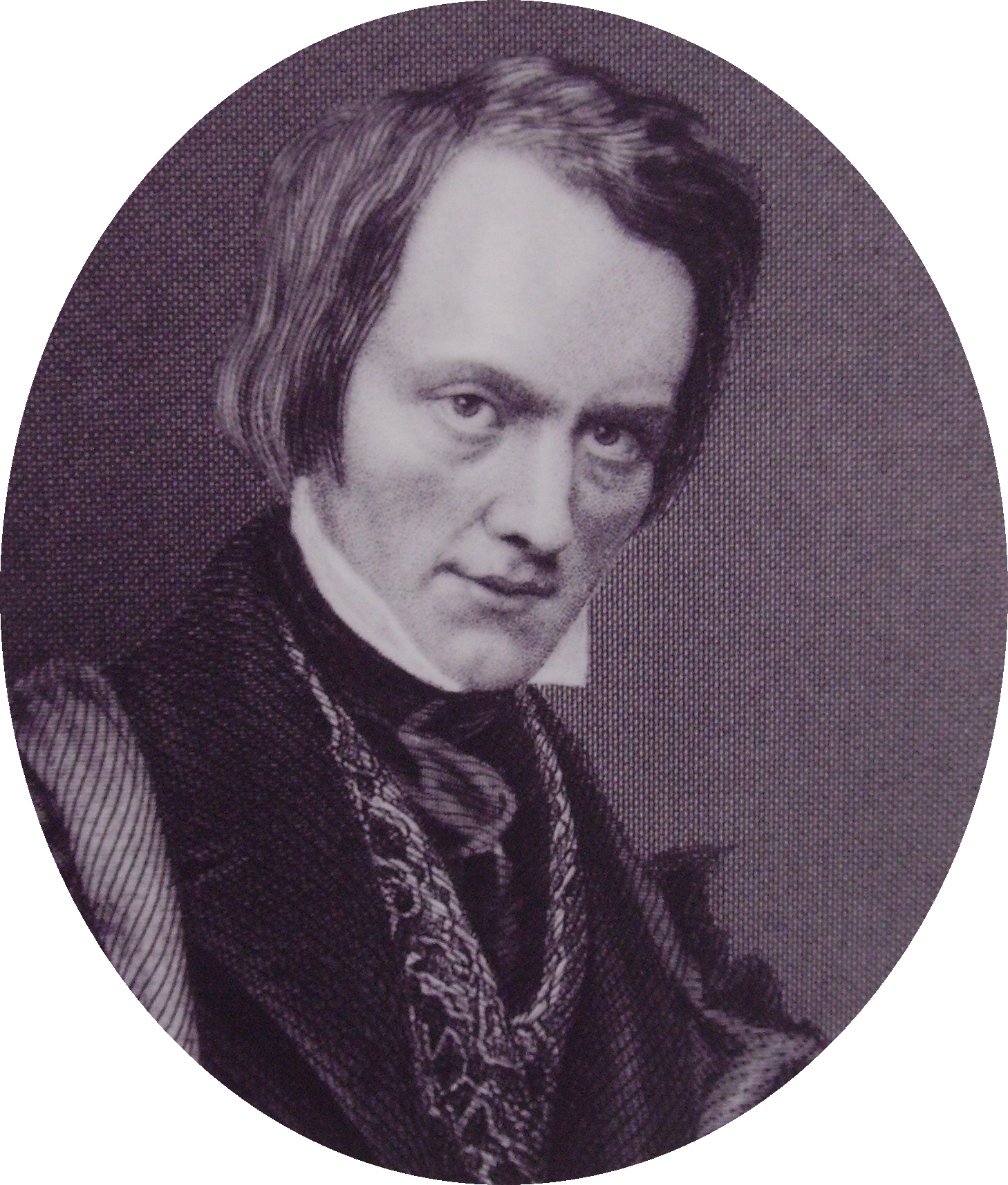 biologist Richard Owen (1804-1892)